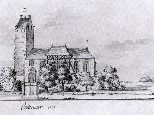 Kerk van het Hoogzand van Oostermeer (It Heechsan) op een prent van Jacobus Stellingwerff